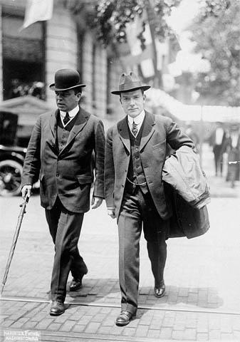 W.L. Mackenzie King (left) and John D. Rockefeller, Jr.